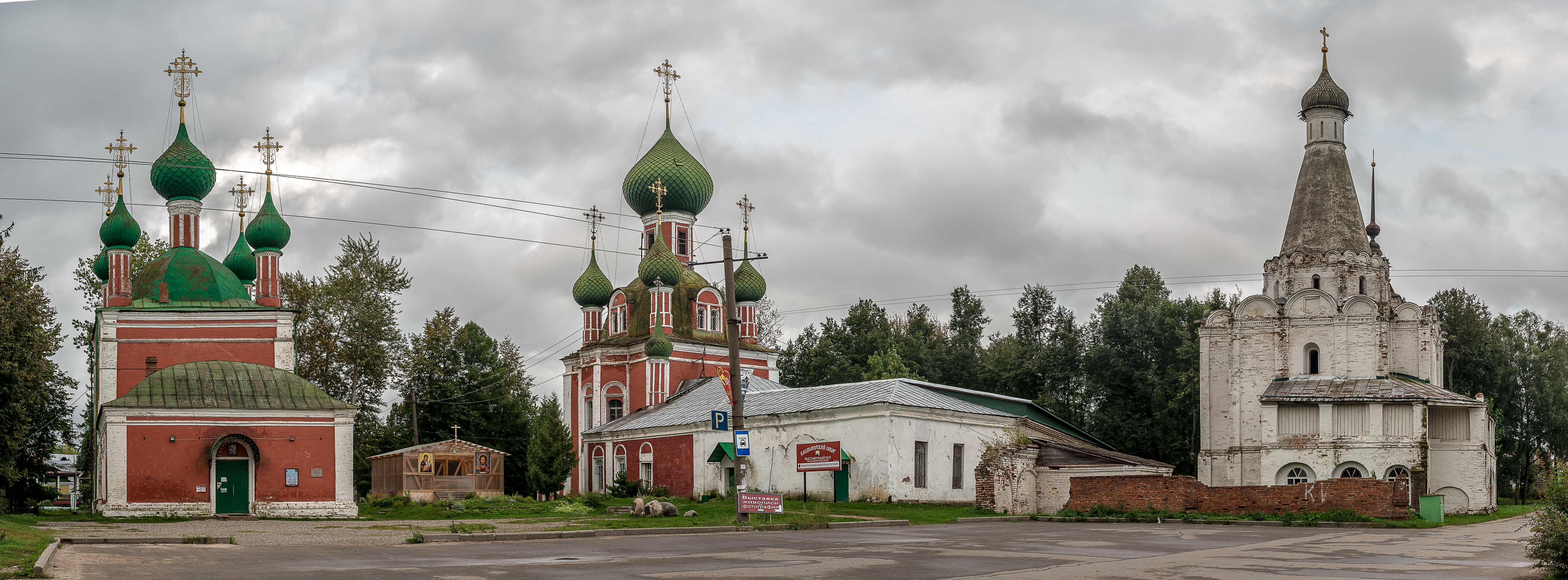 Богородицко-Сретенско-Владимирский монастырь: улица Советская, 10-12, Переславль-Залесский, Ярославская область